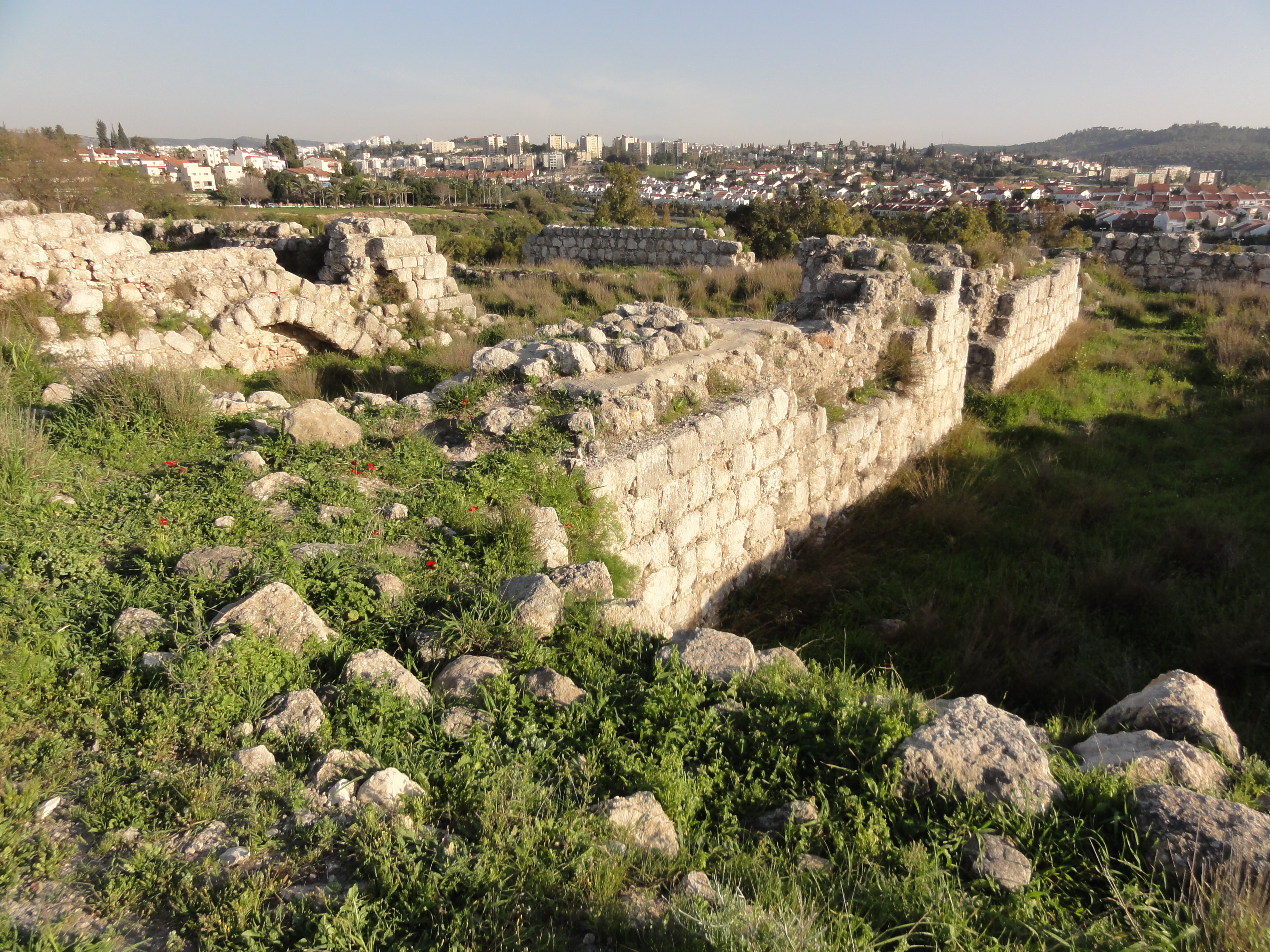 Tel Bet Shemesh